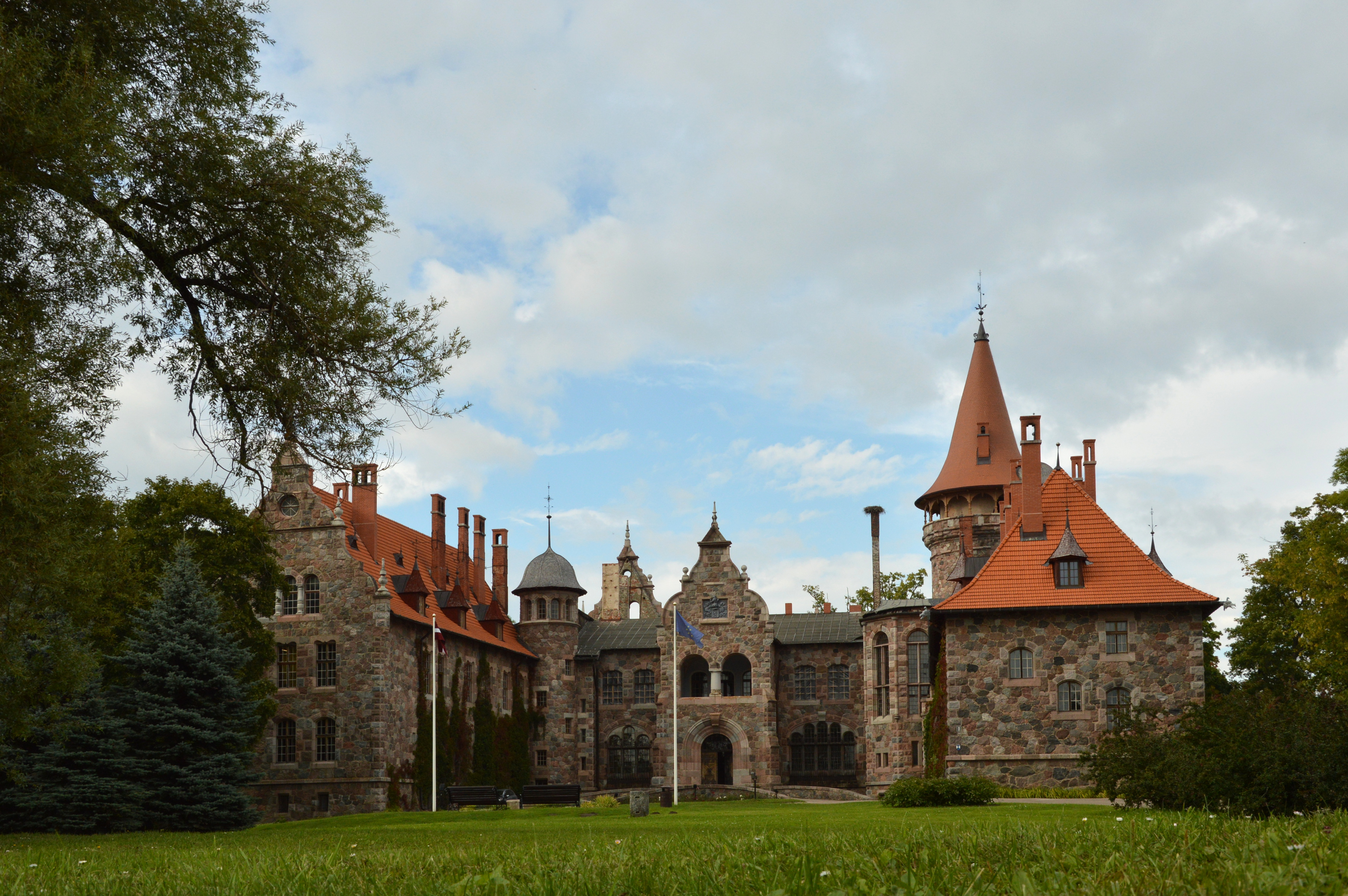 Cesvaine loss